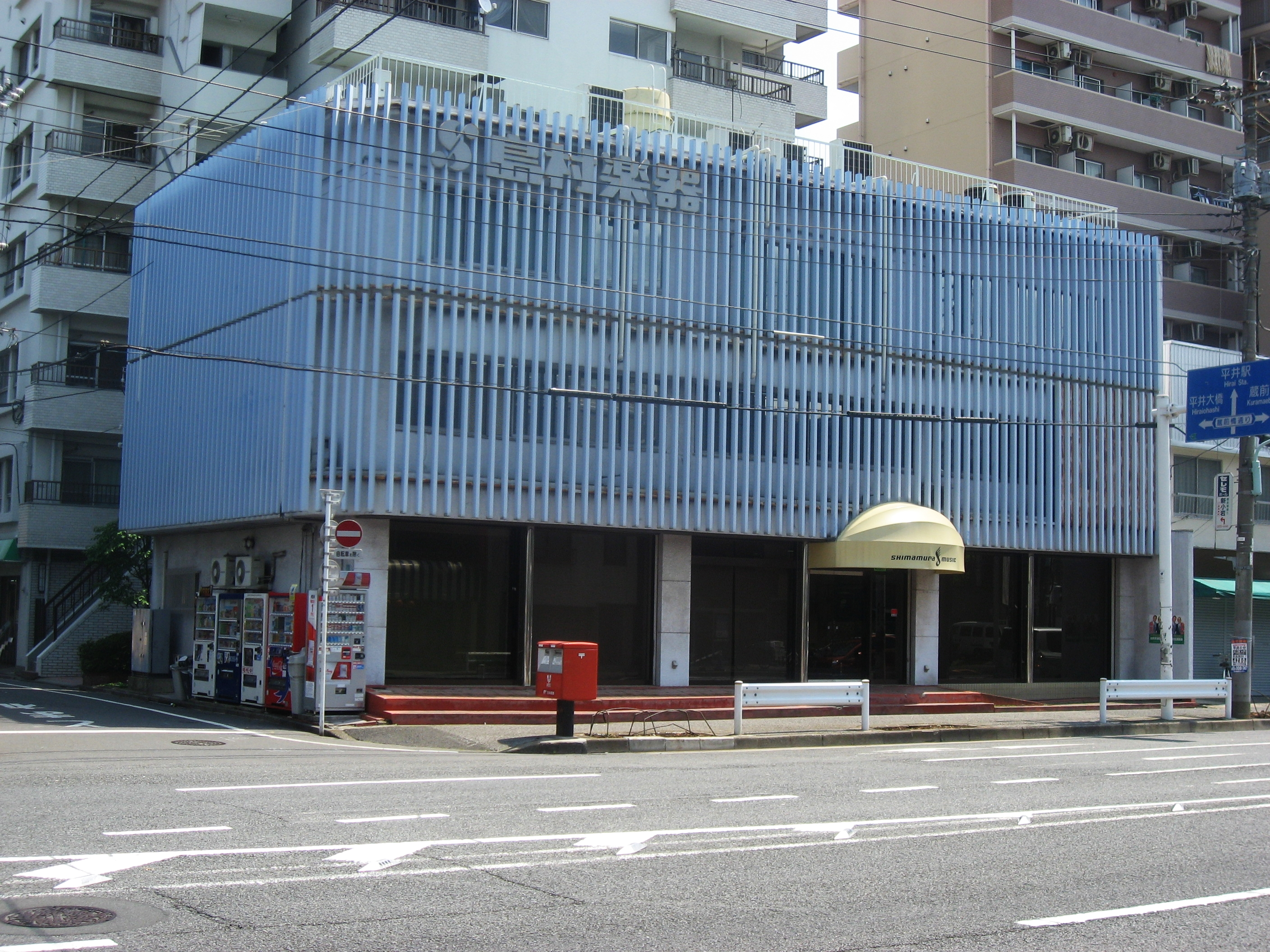 島村楽器株式会社 本社ビル （東京都江戸川区平井）